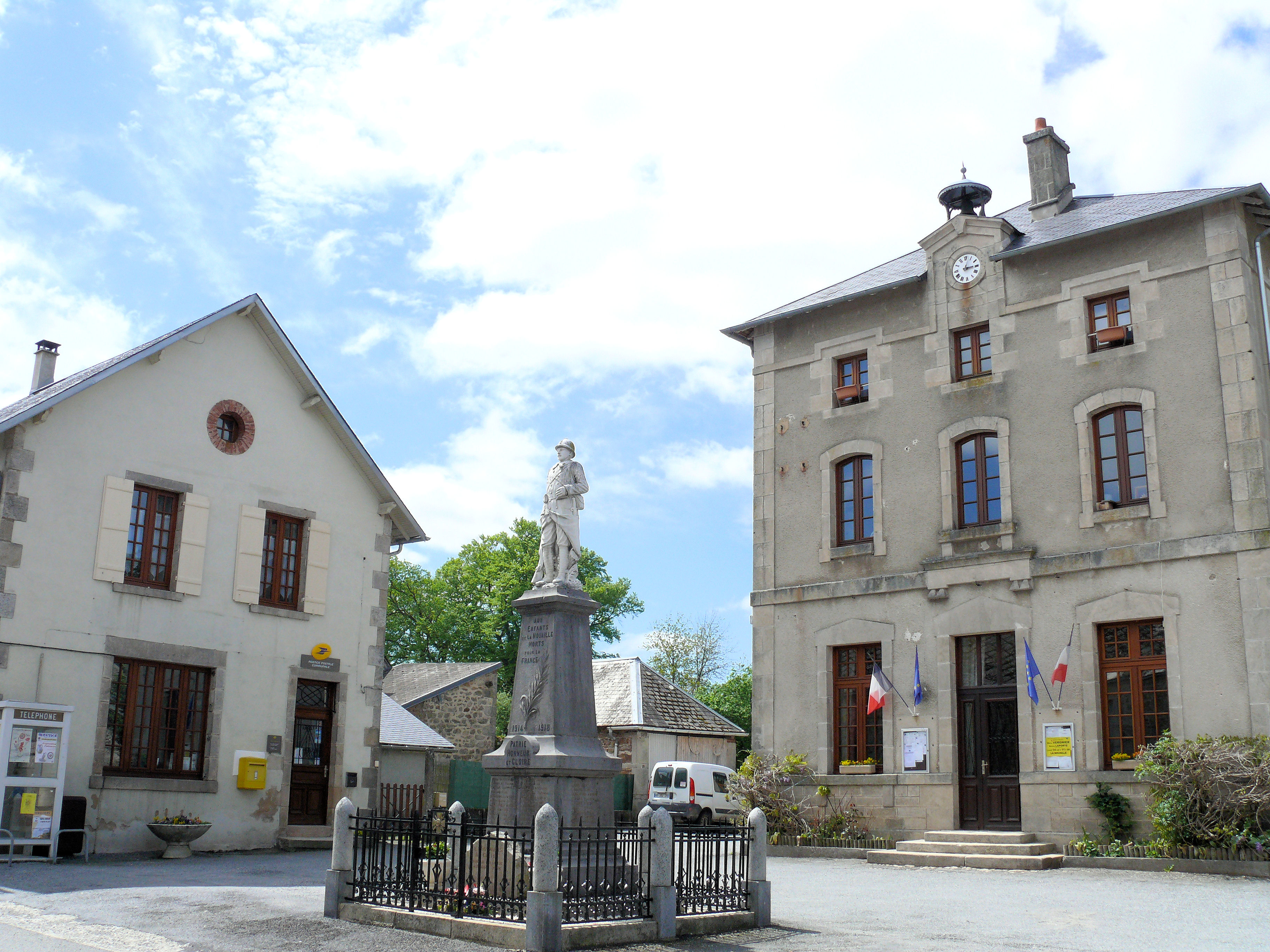 La Nouaille - Mairie et Monument aux Morts